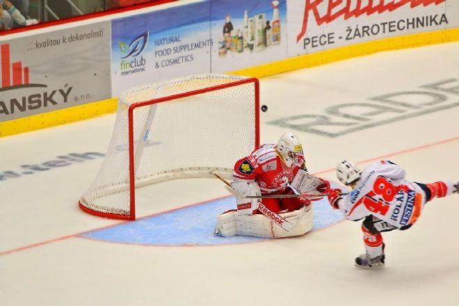 Jan Kolář skóruje proti Třinci